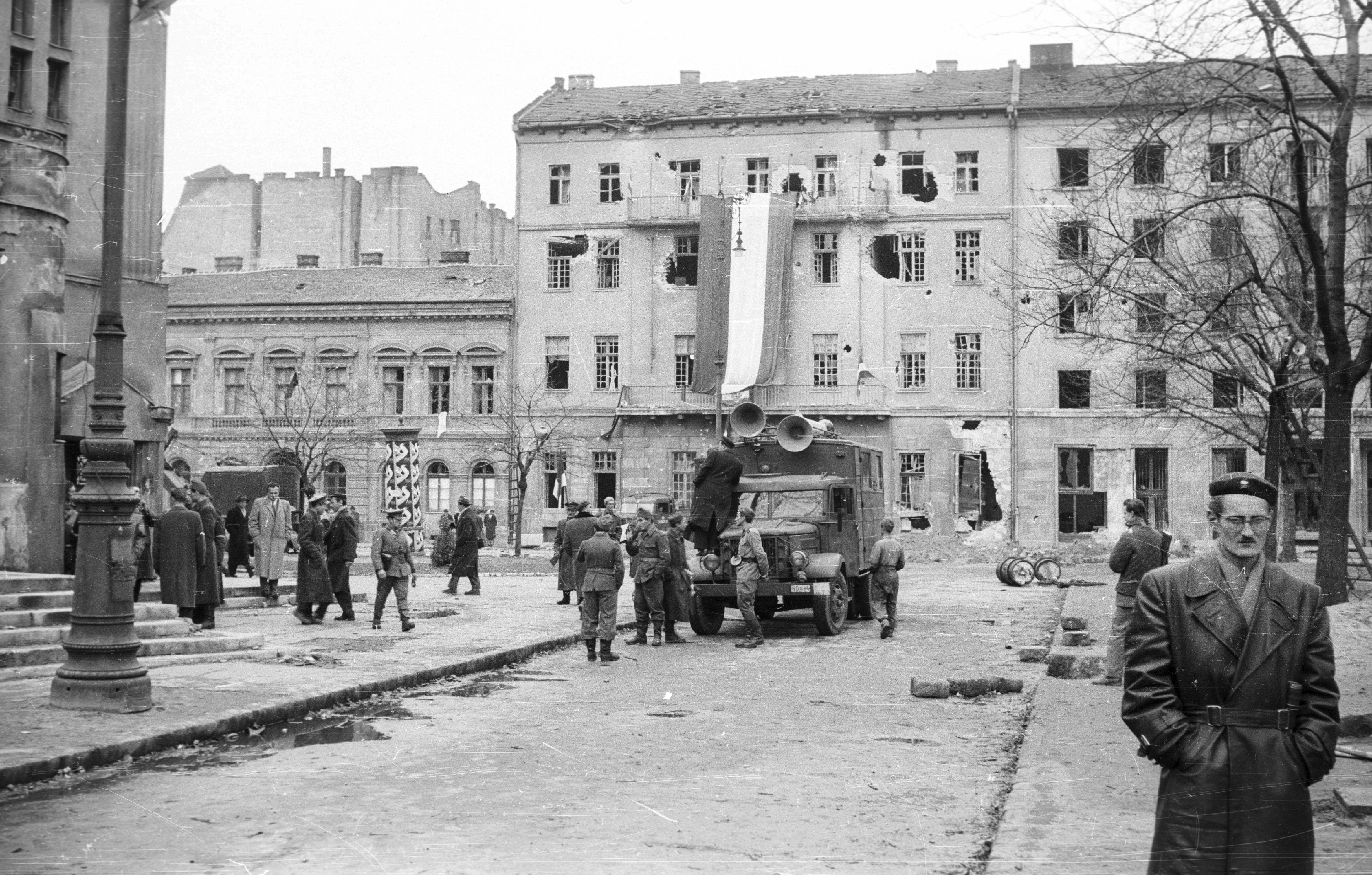 II. János Pál pápa (Köztársaság) tér, MDP Budapesti Pártbizottságának székháza az Erkel színház mellől nézve. Location: Hungary, Budapest VIII. Tags: revolution, damaged building, soldier, pedestrian, commercial vehicle, flag, ad pillar, war damage, Csepel-brand, Hungarian brand, poster, Budapest Title: II. János Pál pápa (Köztársaság) tér, MDP Budapesti Pártbizottságának székháza az Erkel színház mellől nézve.